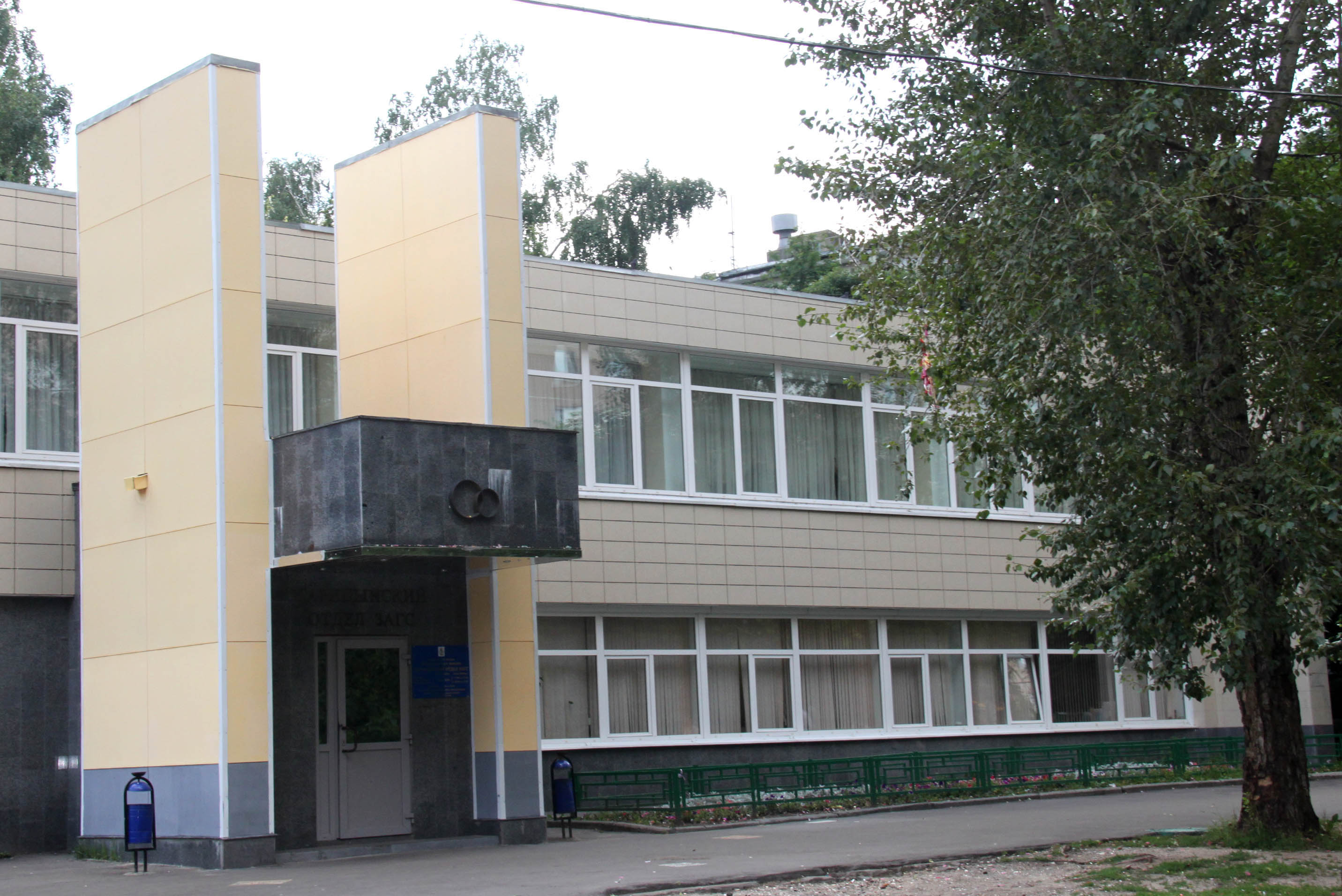 Царицынский отдел ЗАГС. Открыт в июне 1969 года (до 1992 года именовался «Красногвардейский»)